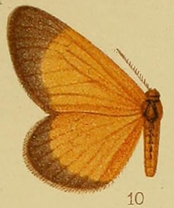 Staphylinochrous fulva